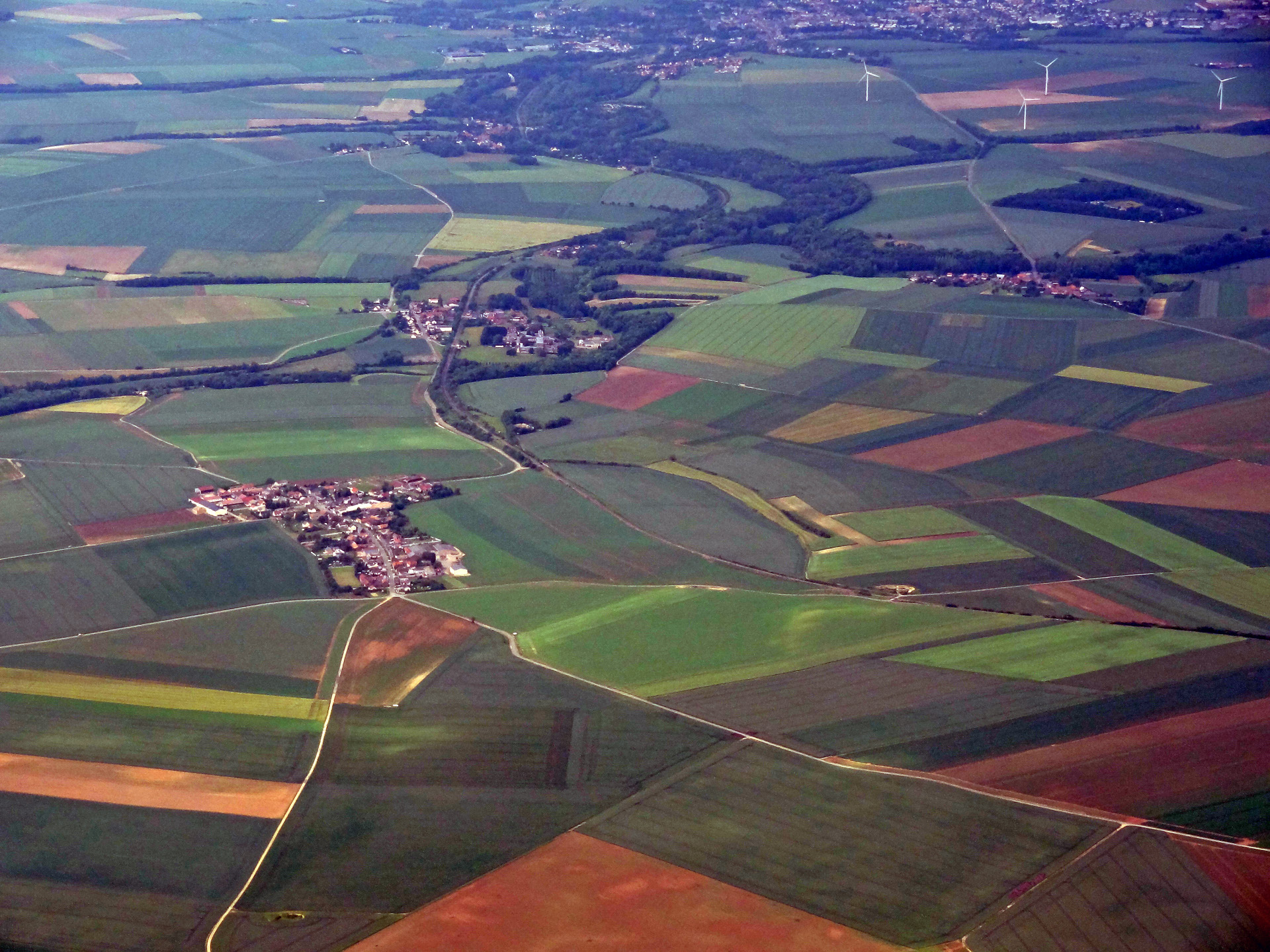 Vue aérienne de Godenvillers et Domfront (Oise), France.